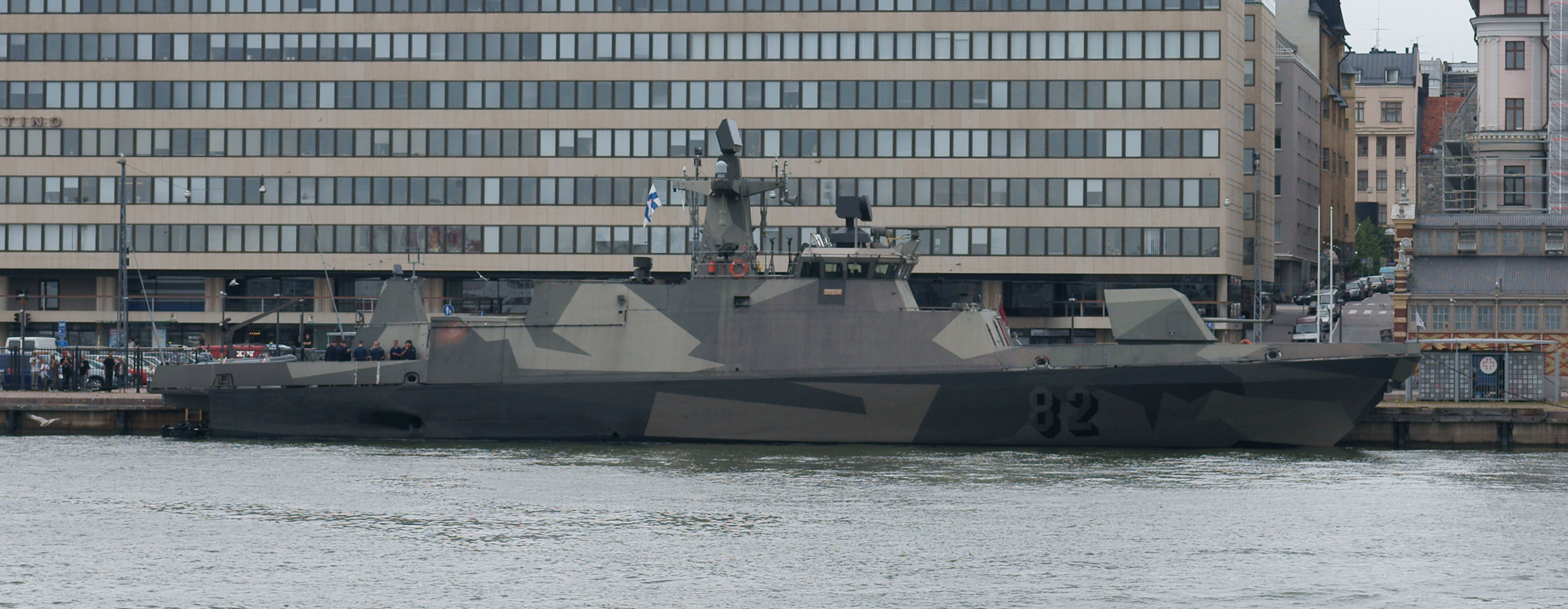 Hamina-luokan ohjusvene Hanko (FNS Hanko (82)).